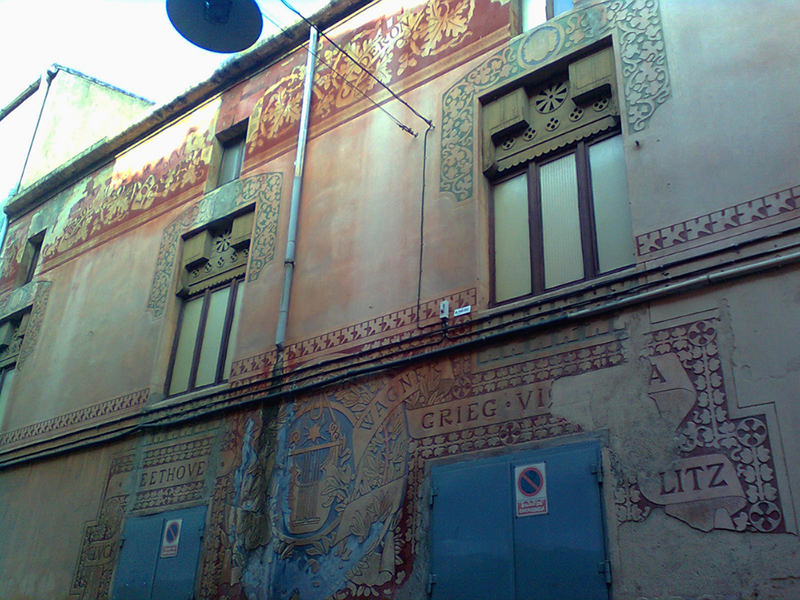 El Cercle Catòlic, carrer Francesc Layret cantonada amb Sant Anastasi. Detall de la paret.